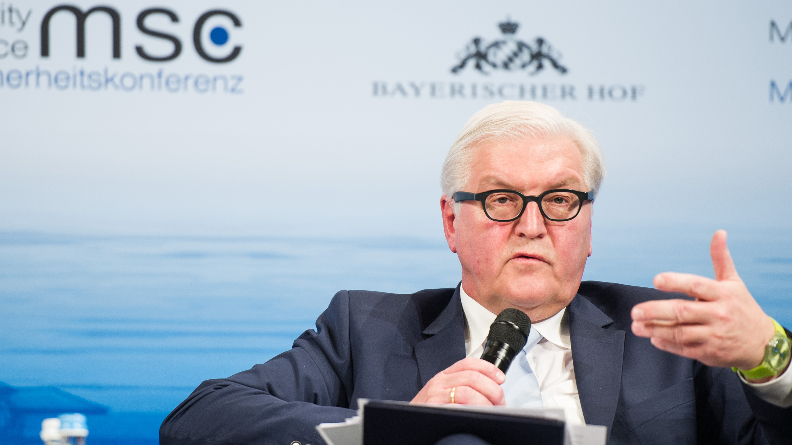 Frank-Walter Steinmeier während der Münchner Sicherheitskonferenz 2016